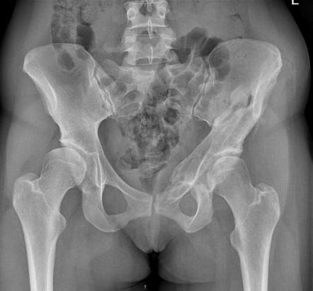 Triple-Osteotomie – 1 Jahr postop